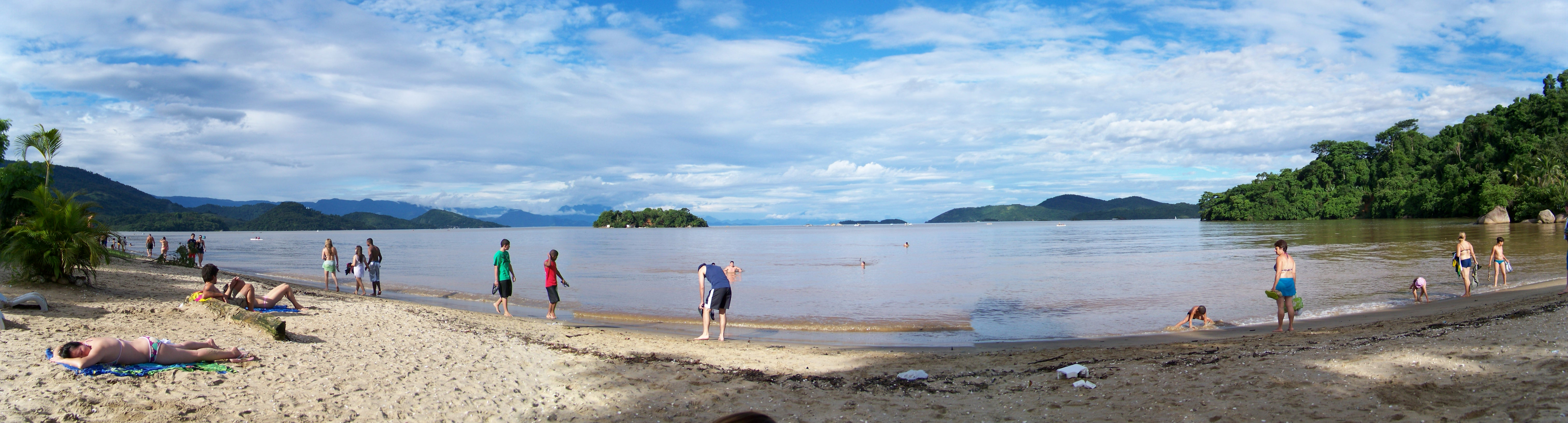 Paraty RJ, panorâmica praia do Jabquara próximo ao Forte do Pontal